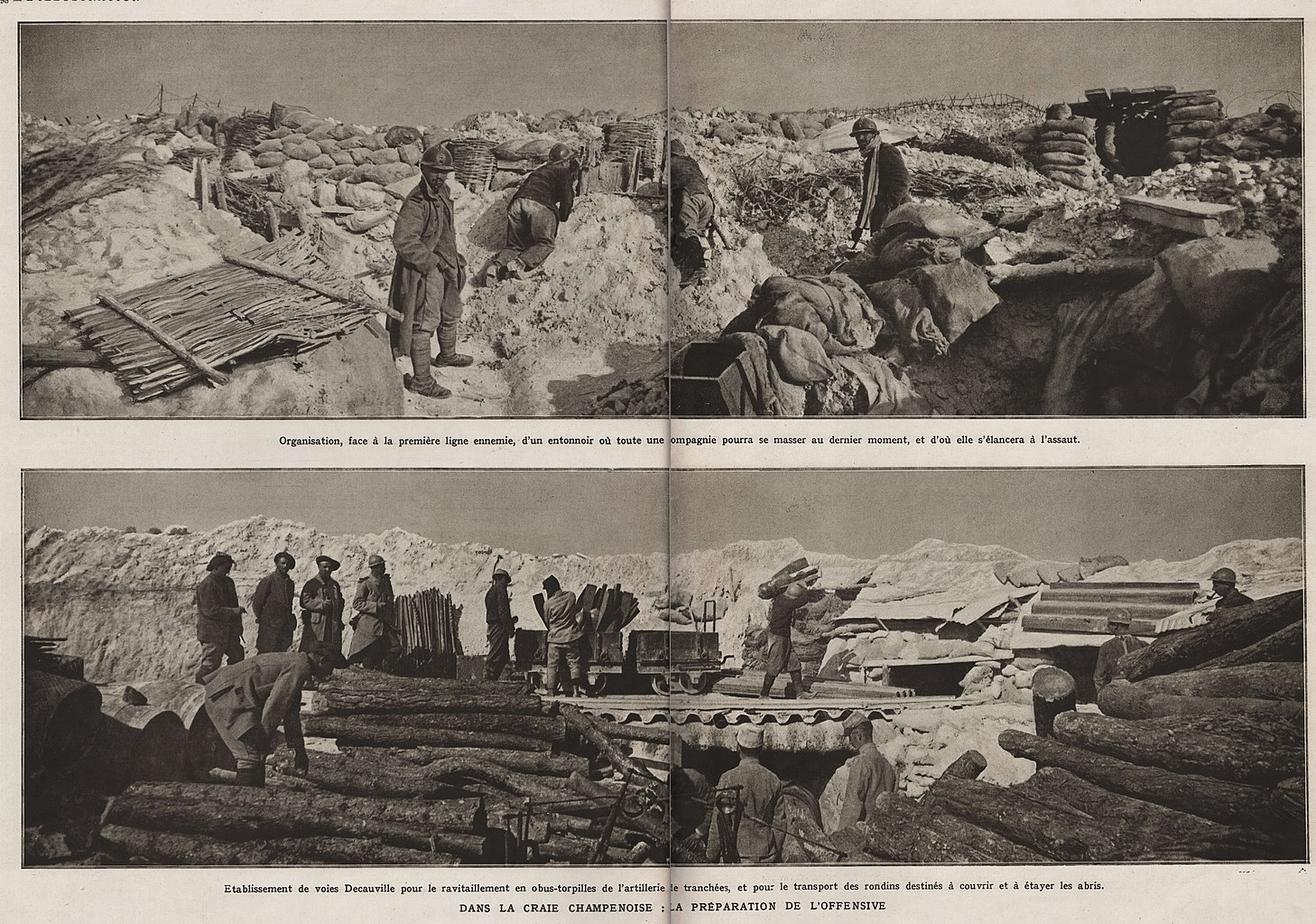 L'Illustration No 3789 16 Octobre 1915 Page 398 and 399